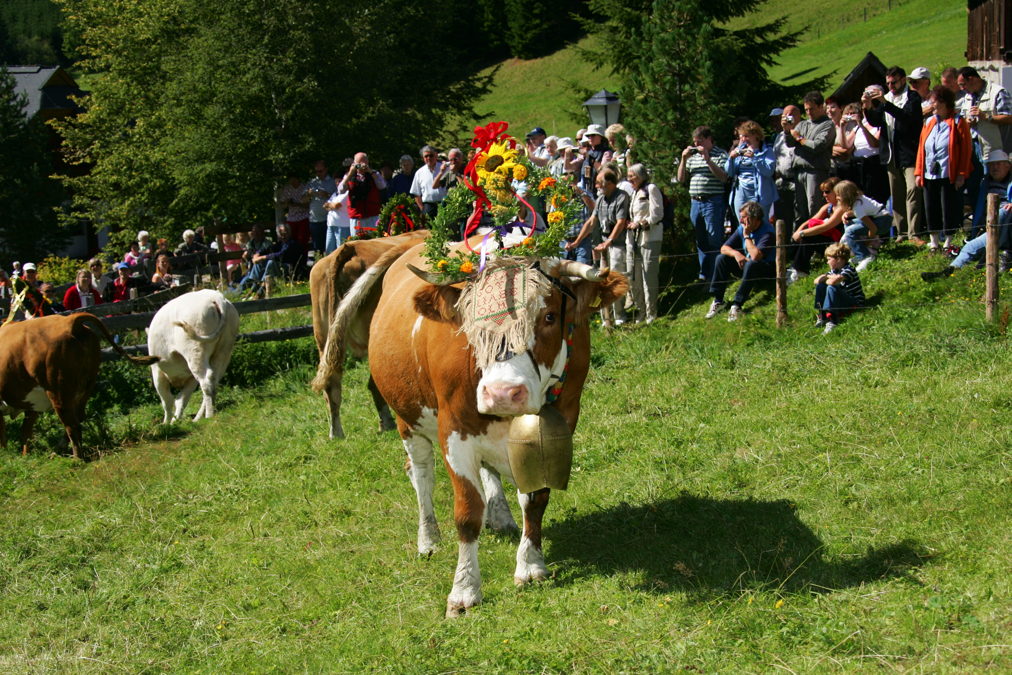 Almabtrieb nach Bad Kleinkirchheim im Jahr 2006